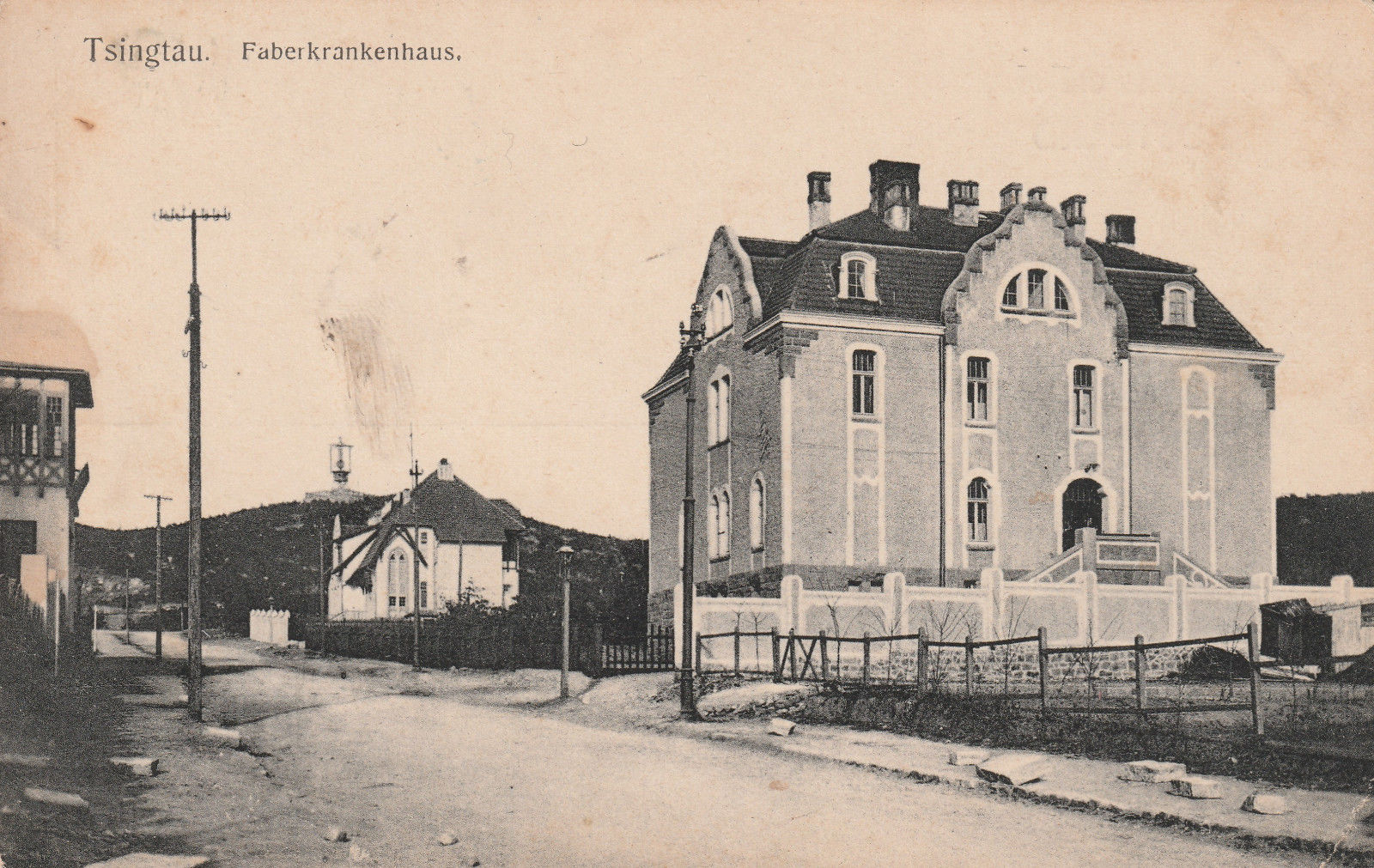 Faberkrankenhaus